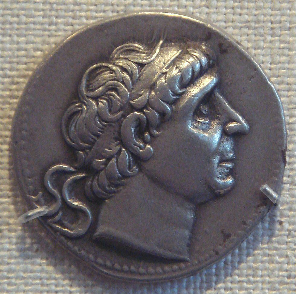 Antiochus II